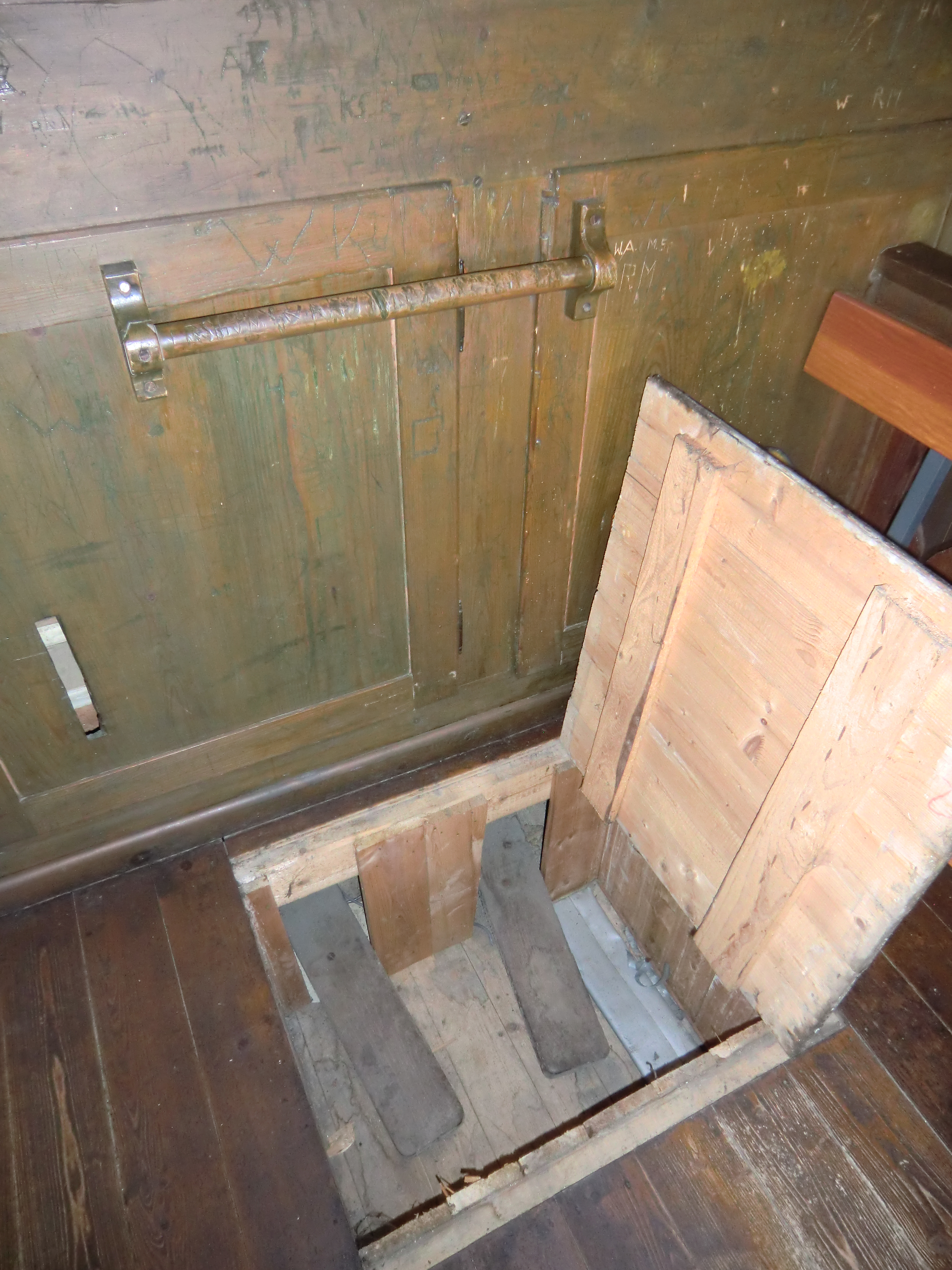 Horn-Orgel in Ransel (1912) - Kalkantentritte im Boden